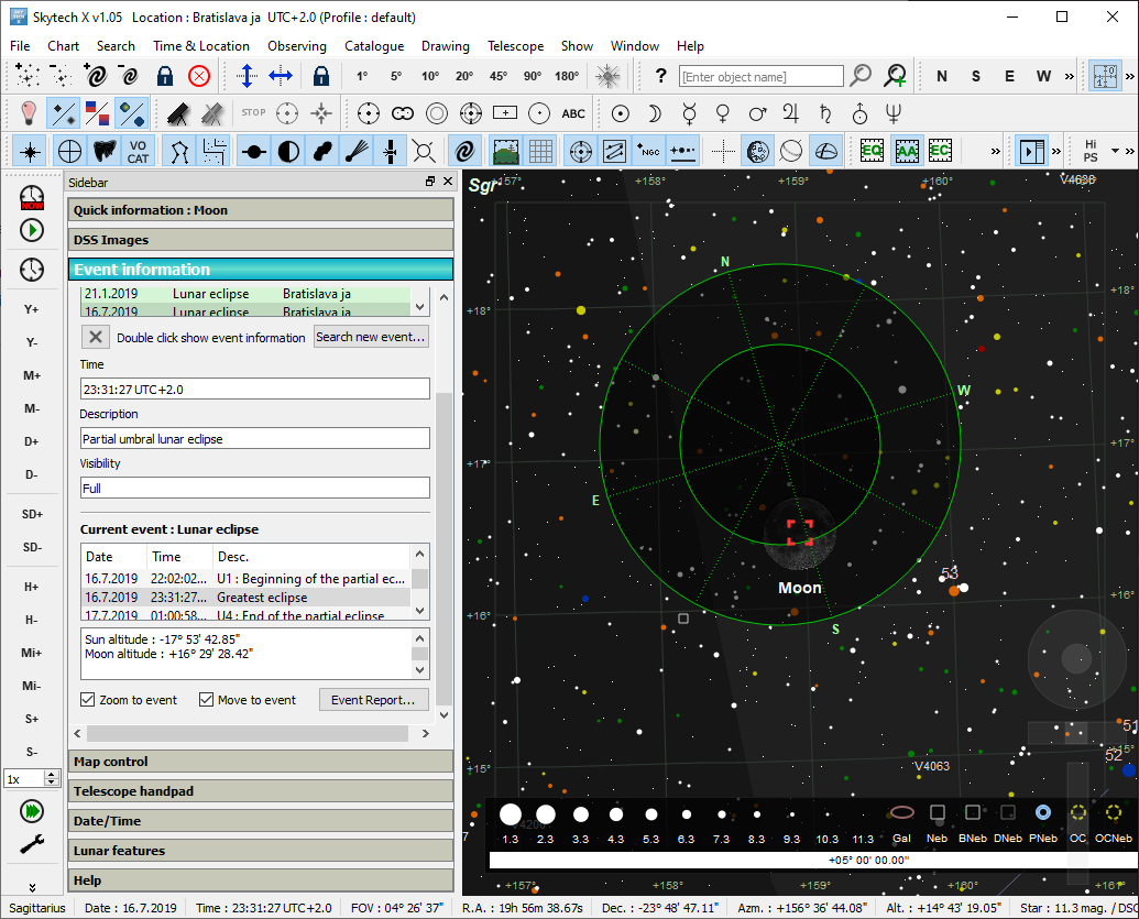 Počítačový program na simuláciu astronomické planetária.